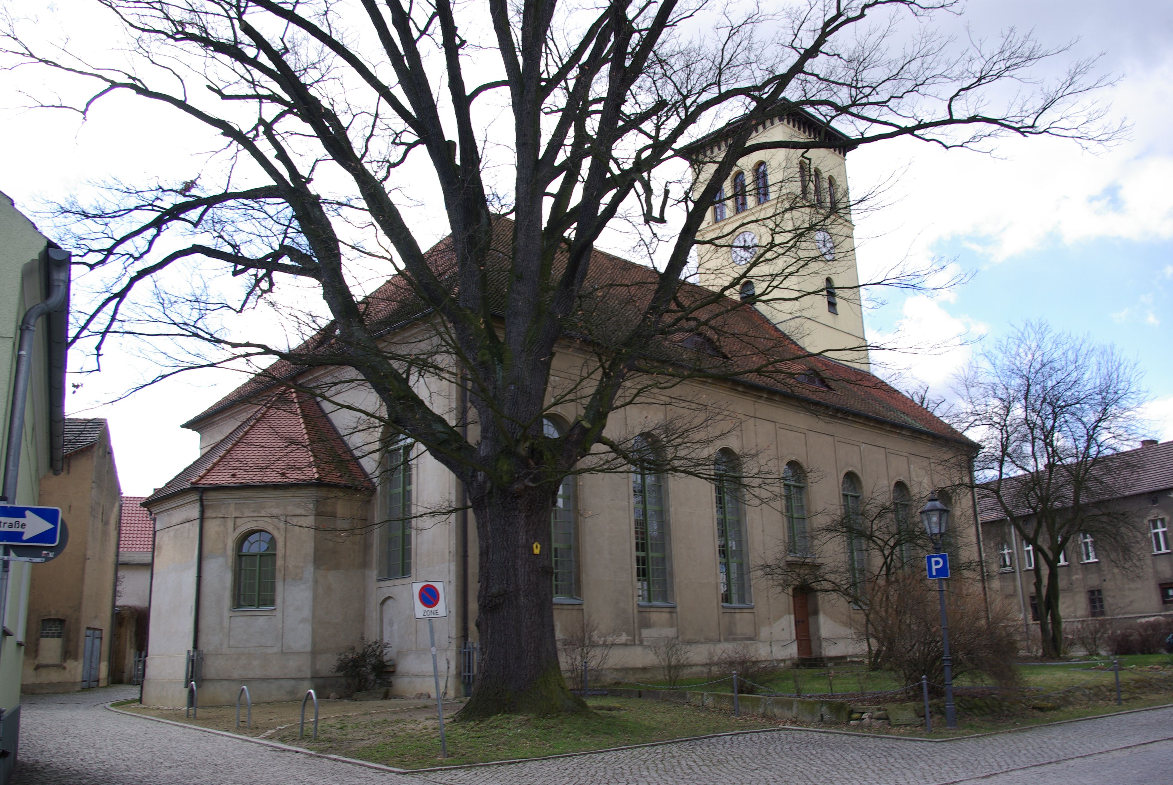 Golßen in Brandenburg. Die Kirche in der Schulstraße stammt aus dem 19. Jahrhundert und steht unter Denkmalschutz.